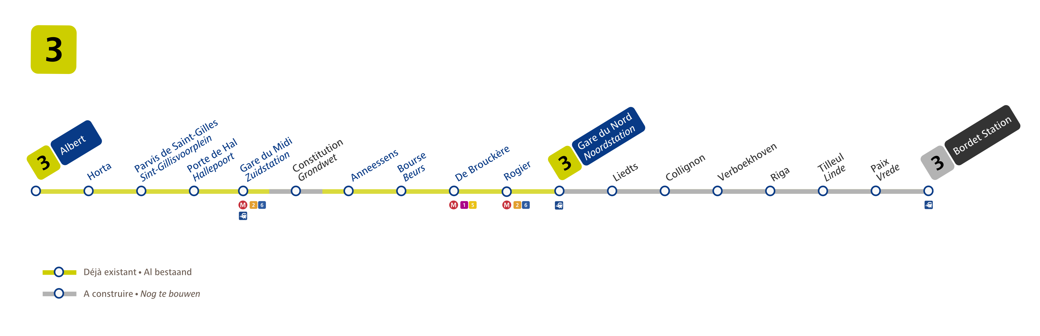 Plan de la futur ligne 3 de métro. La partie en gris reste à construire.